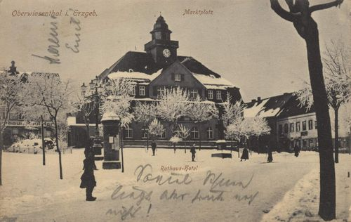 Albin Meiche Oberwiesenthal Marktplatz Postkarte 1929 gelaufen